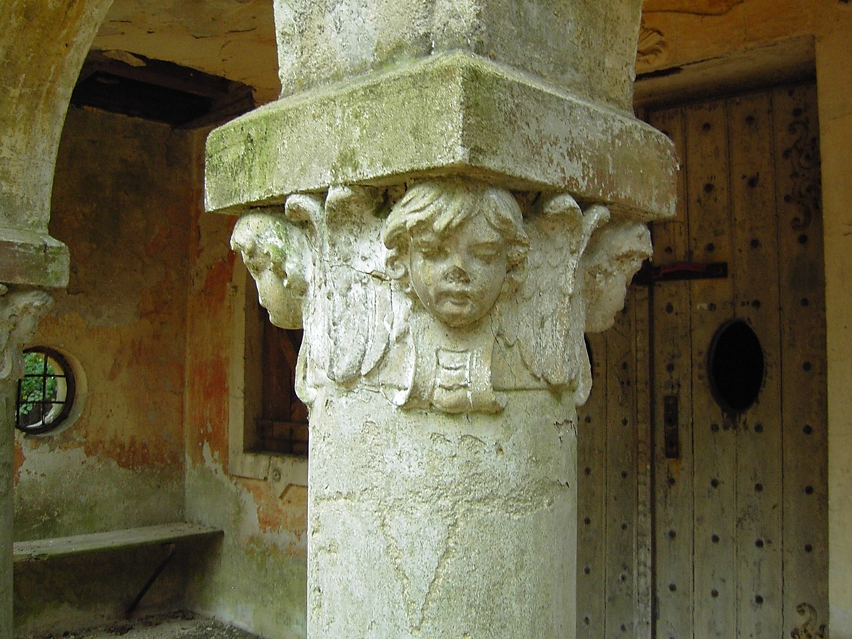 Kaple svatého Jáchyma na vrchu Jáchym u Lobendavy